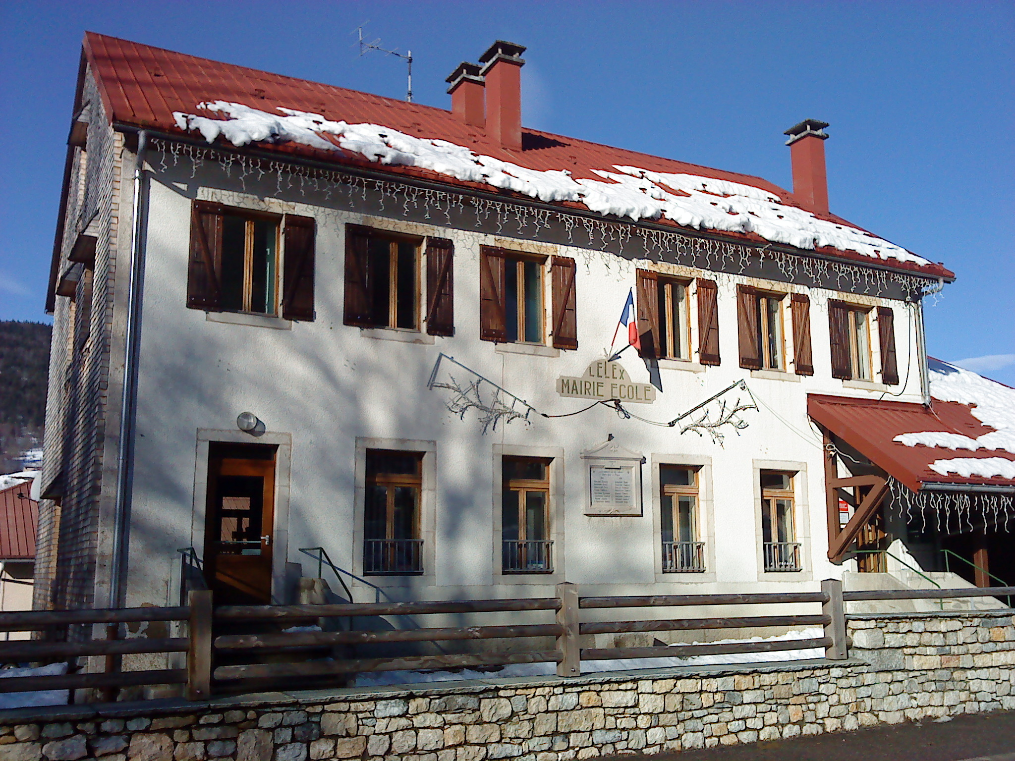 Mairie (et école) de Lélex, Ain, France.